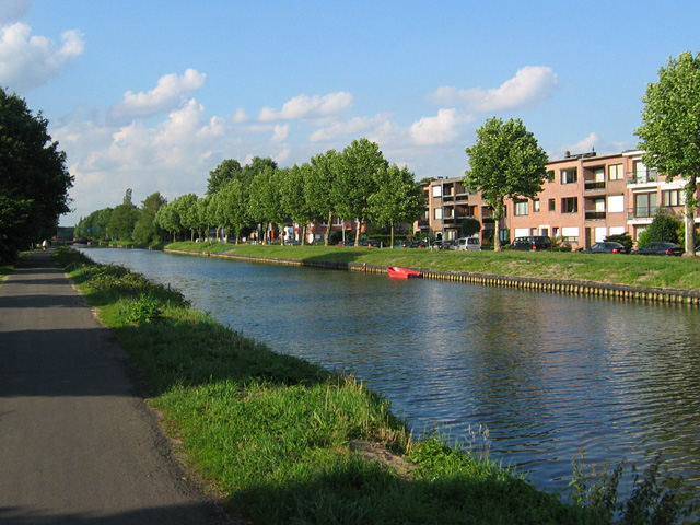 Schotenvaart, de Schotense naam voor het Kempisch Kanaal tussen Schoten en Turnhout/Dessel